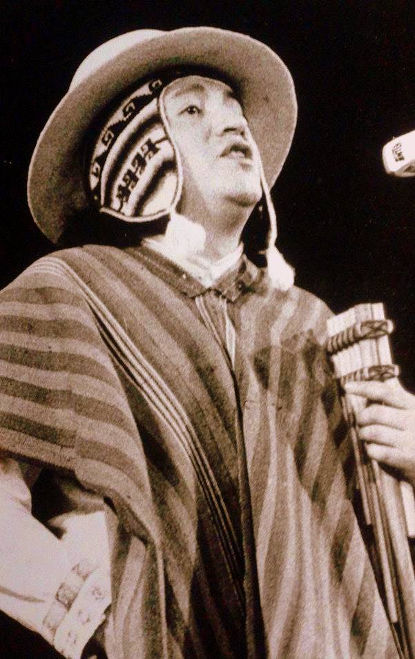 Mario Porfirio Gutiérrez